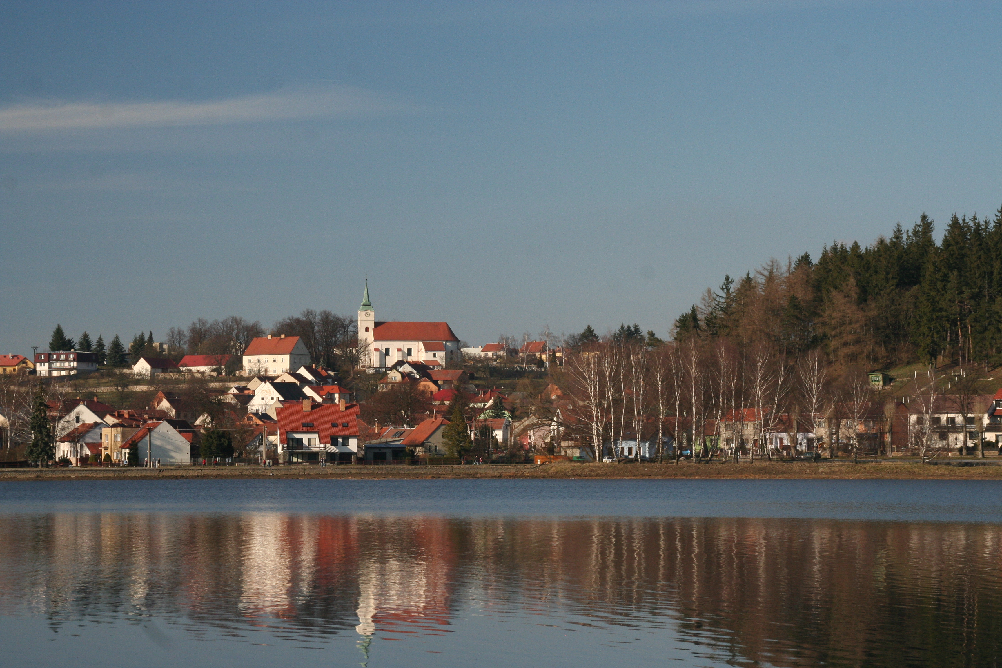 Jedovnice - pohled přes rybník ke kostelu